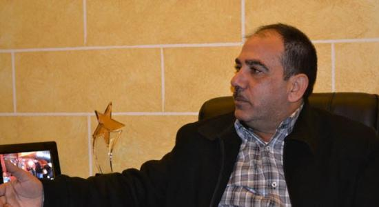 عباس دبوق أبو أسامة عباس جمعة